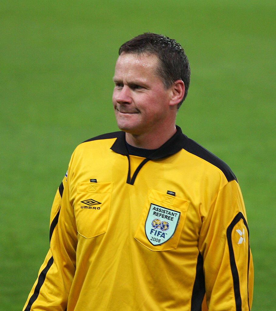 Erik Ræstad